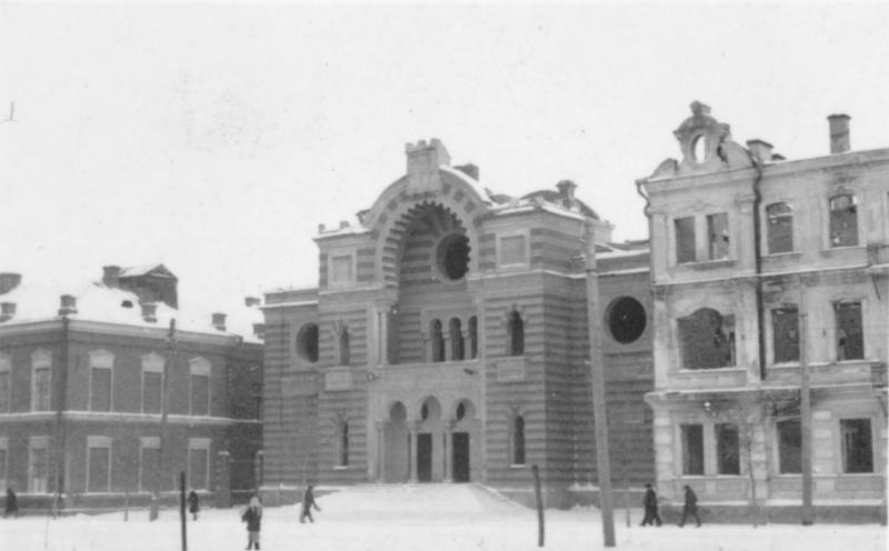 Minsk, 1. Dez. 1942 Jüdisches Staatstheater in Minsk (bis 1924 Hauptsynagoge) Einsatzstab Reichsleiter Rosenberg für die besetzten Gebiete - Hauptarbeitsgruppe Ostland Film: 49/12 Information added by Wikimedia users.